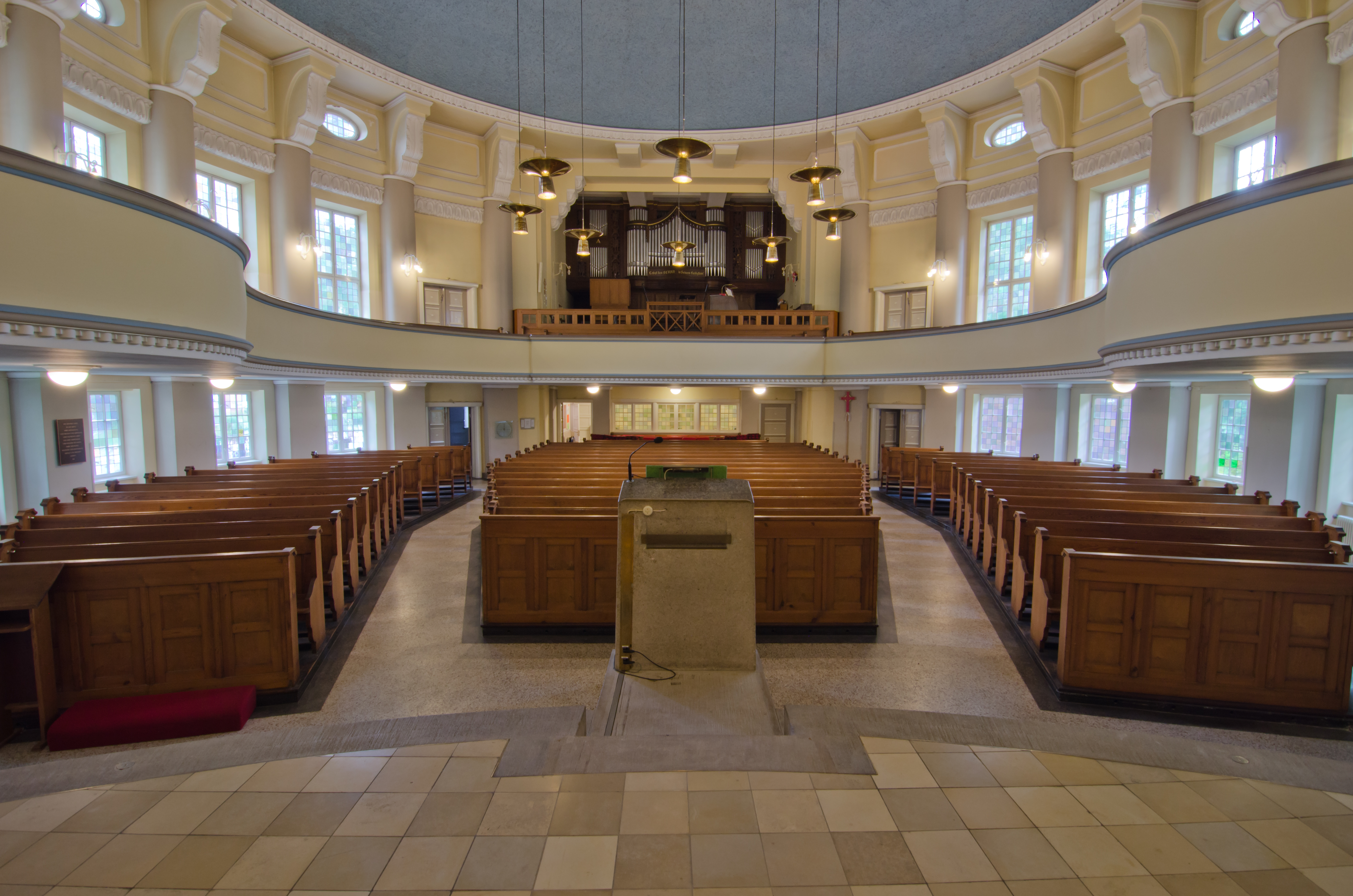 Hamburg Auferstehungskirche Barmbek, Blick zum Orgel